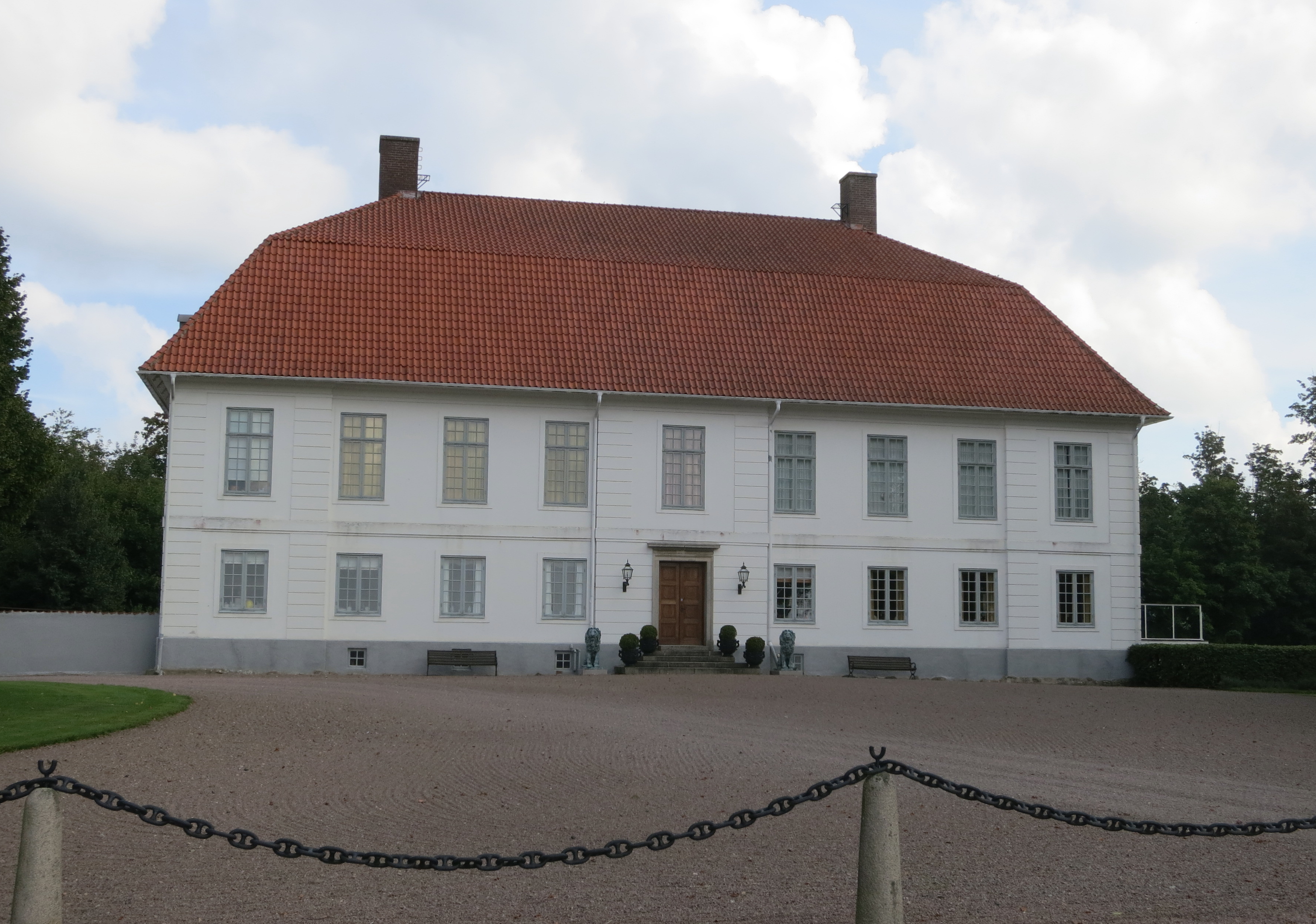 Gedsholm